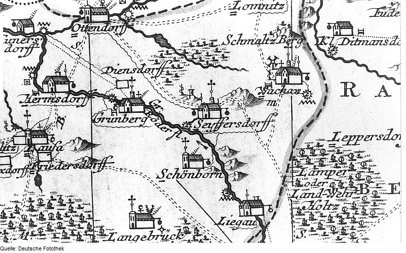 Original image description from the Deutsche Fotothek Wachau-Seifersdorf. Ausschnitt aus: Seutter, Kirchenkreis Dresden, Mitte 18. Jh. (Sign.: VII 43)